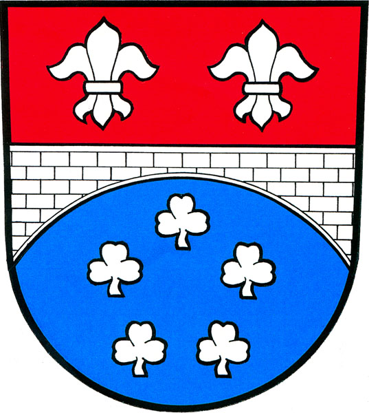 Znak obce Nová Ves u Chotěboře